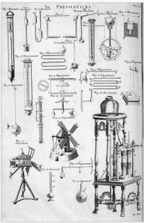 Taula pneumatikoa, 1728 Cyclopaedia.